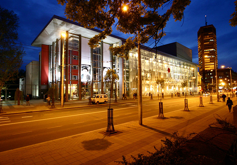 Jugoslovensko dramsko pozorište i Beograđanka